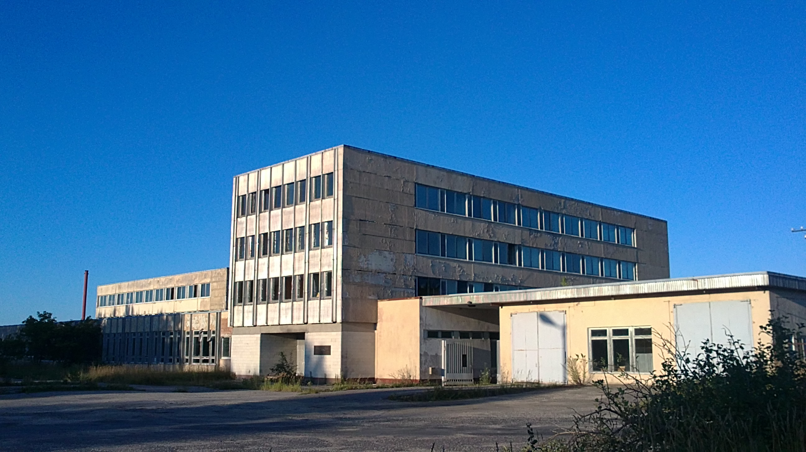 Võhma Võhma Lihakombinaadi hooned, 2011. aasta suvi